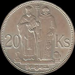 20 Slovak korún coin from 1941 - reverse